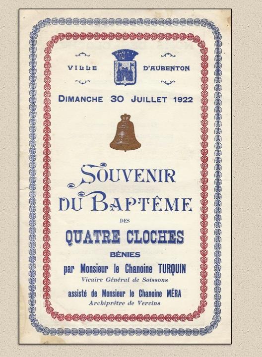 La petite ville d'Aubenton en Thiérache (Aisne) est occupée par les troupes allemandes jusqu'au 9 novembre 1918. Les cloches en bronze ont été envoyées en Allemagne pour devenir canons. Quatre ans après la fin du conflit, quatre nouvelles cloches viennent sonner les heures et les moments de vie religieuse dans l'immense clocher de Notre-Dame d'Aubenton...